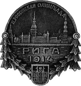 Значок, посвященный II Всероссийской олимпиаде